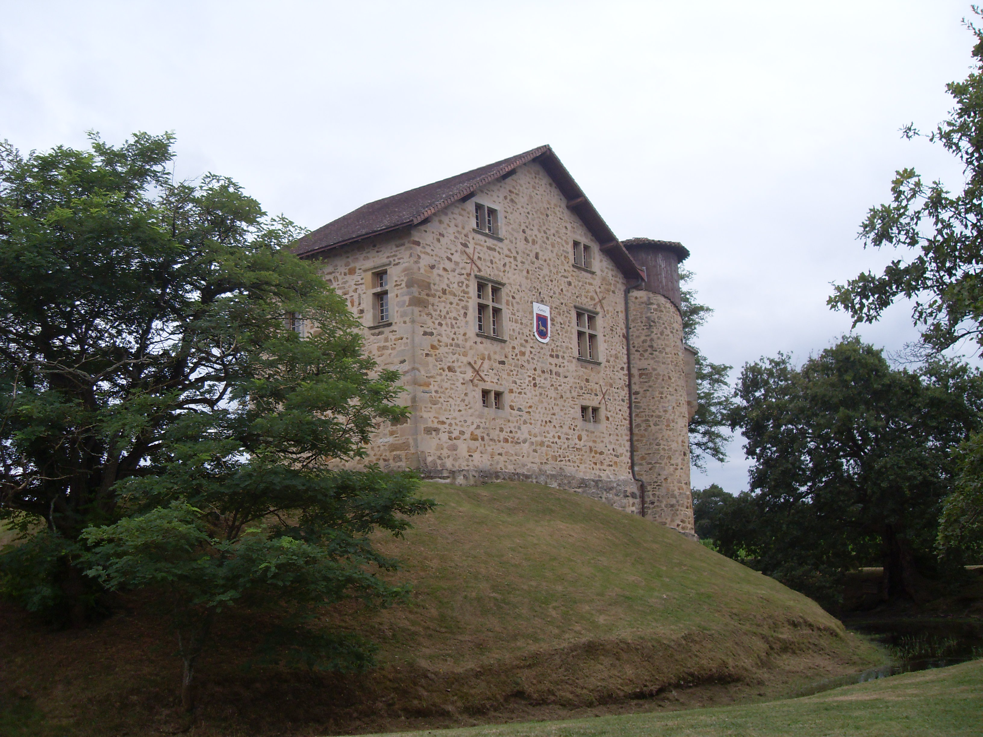 Château de Camou motte, fossé, basse cour